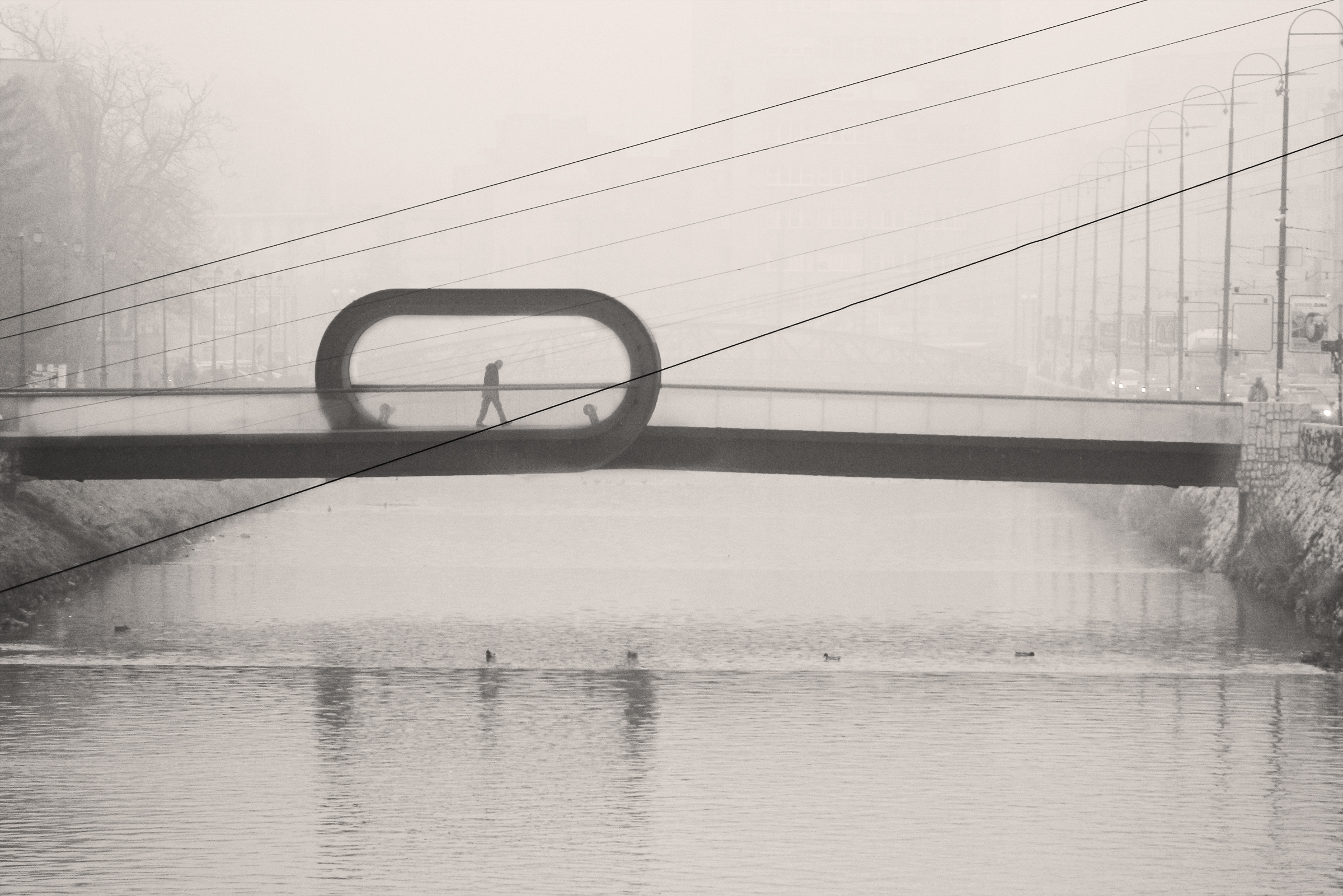 Loop Bridge 01